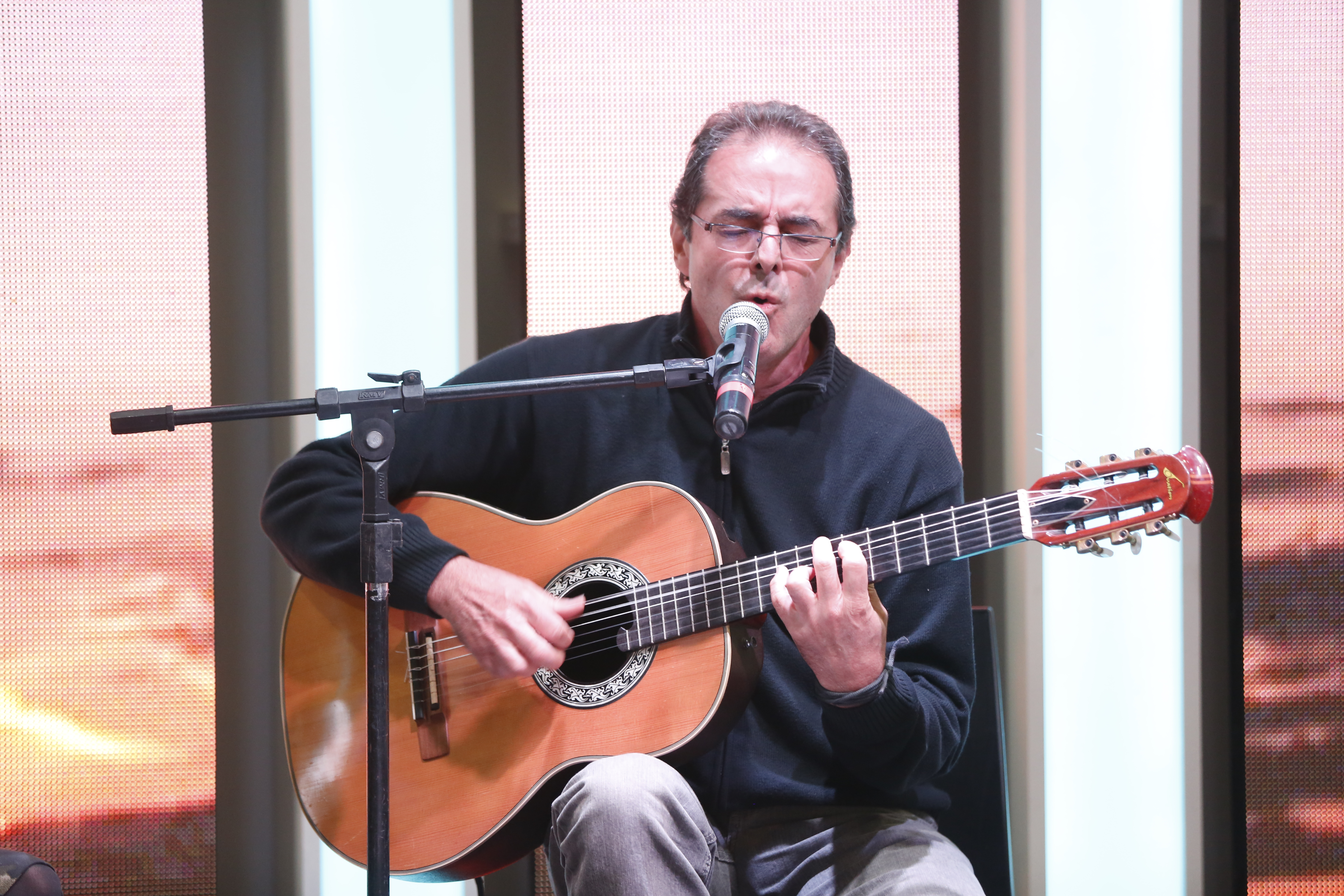 Buenos Aires, 3 de mayo de 2015 - En el marco de la 41ª Feria Internacional del Libro de Buenos Aires, como parte del Ciclo "Letra y Música", se realizó en el stand del Ministerio de Cultura de la Nación una charla con Jorge Fandermole y María Negroni.